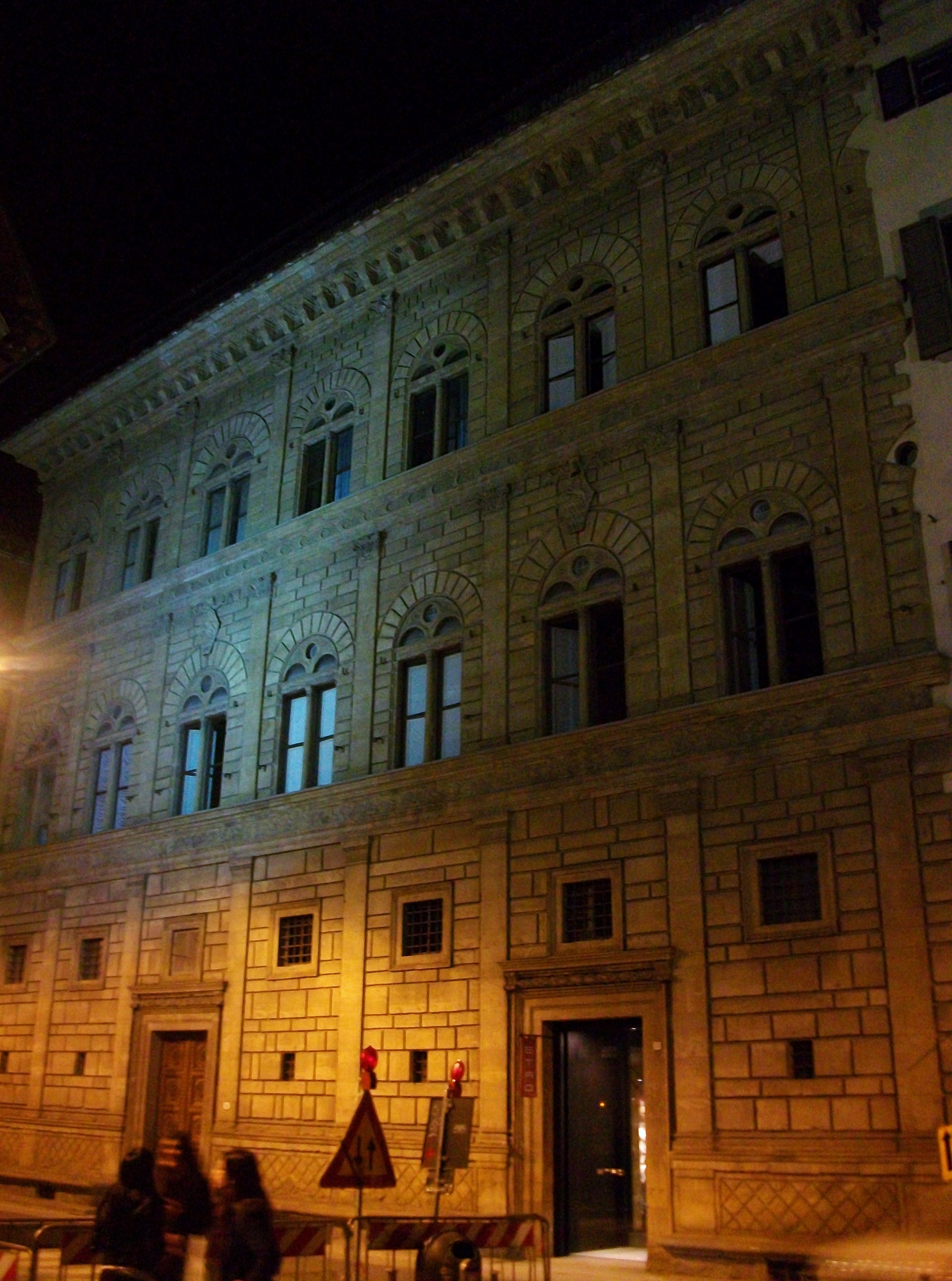 Palau Rucellai de nit, Florència.